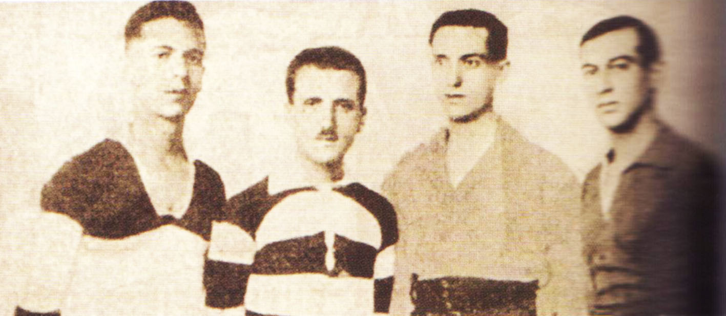 Οι αρχηγοί 4 ομάδων που συμμετείχαν στο πρωτάθλημα ΕΠΣΑΠ το 1923. Καζάκος - Πειραϊκή ένωση, Χατζηανδρέου - Πειραϊκός Σύνδεσμος, Γροσομανίδης - Πανιώνιος, Λουκάς Πανουργιάς - Παναθηναϊκός